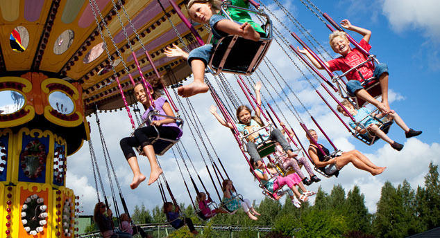 Pressbild på attraktionen Slänggungan på Skara Sommarland innan den målades om